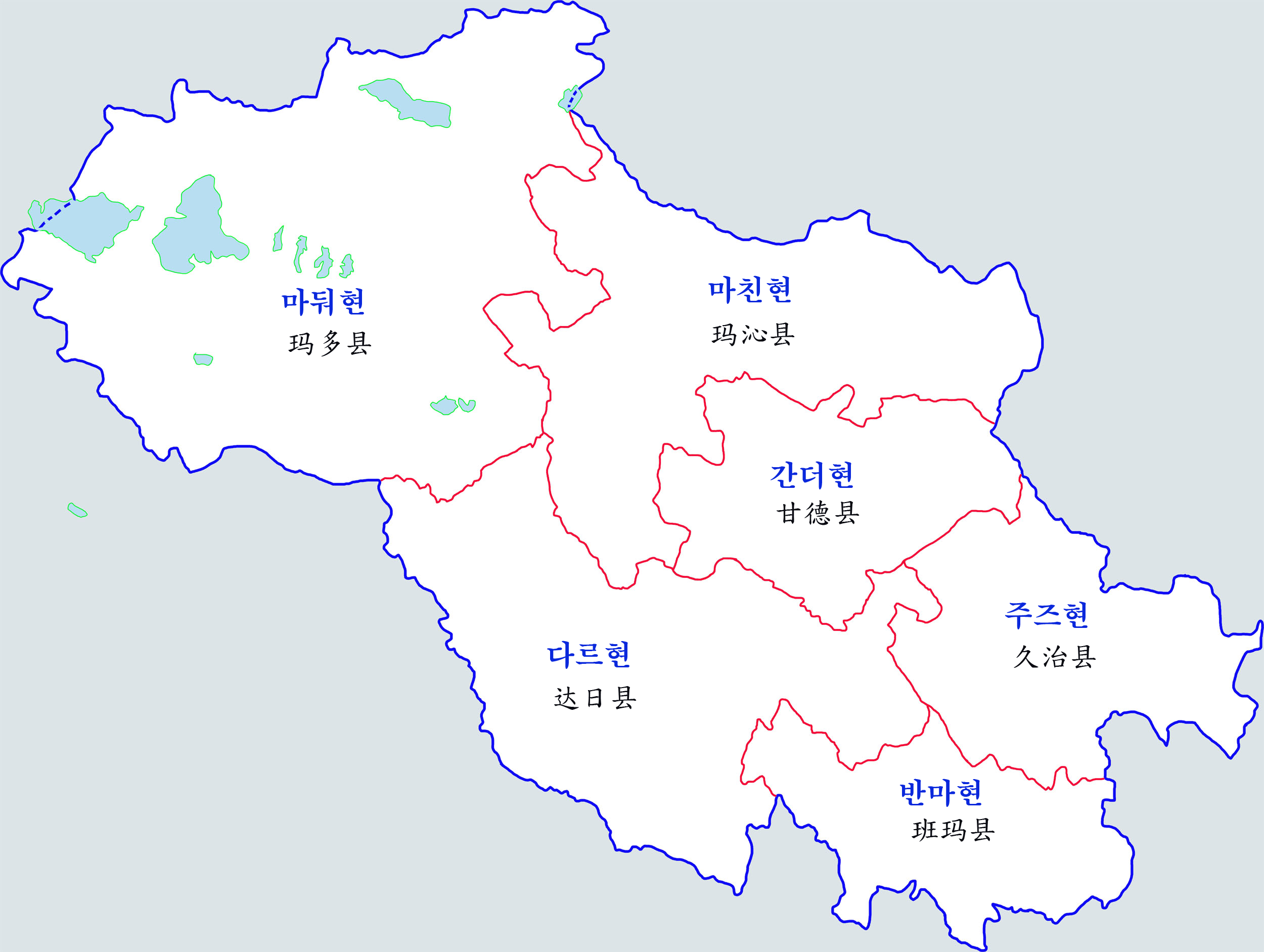 궈러티베트족자치주 행정구역도